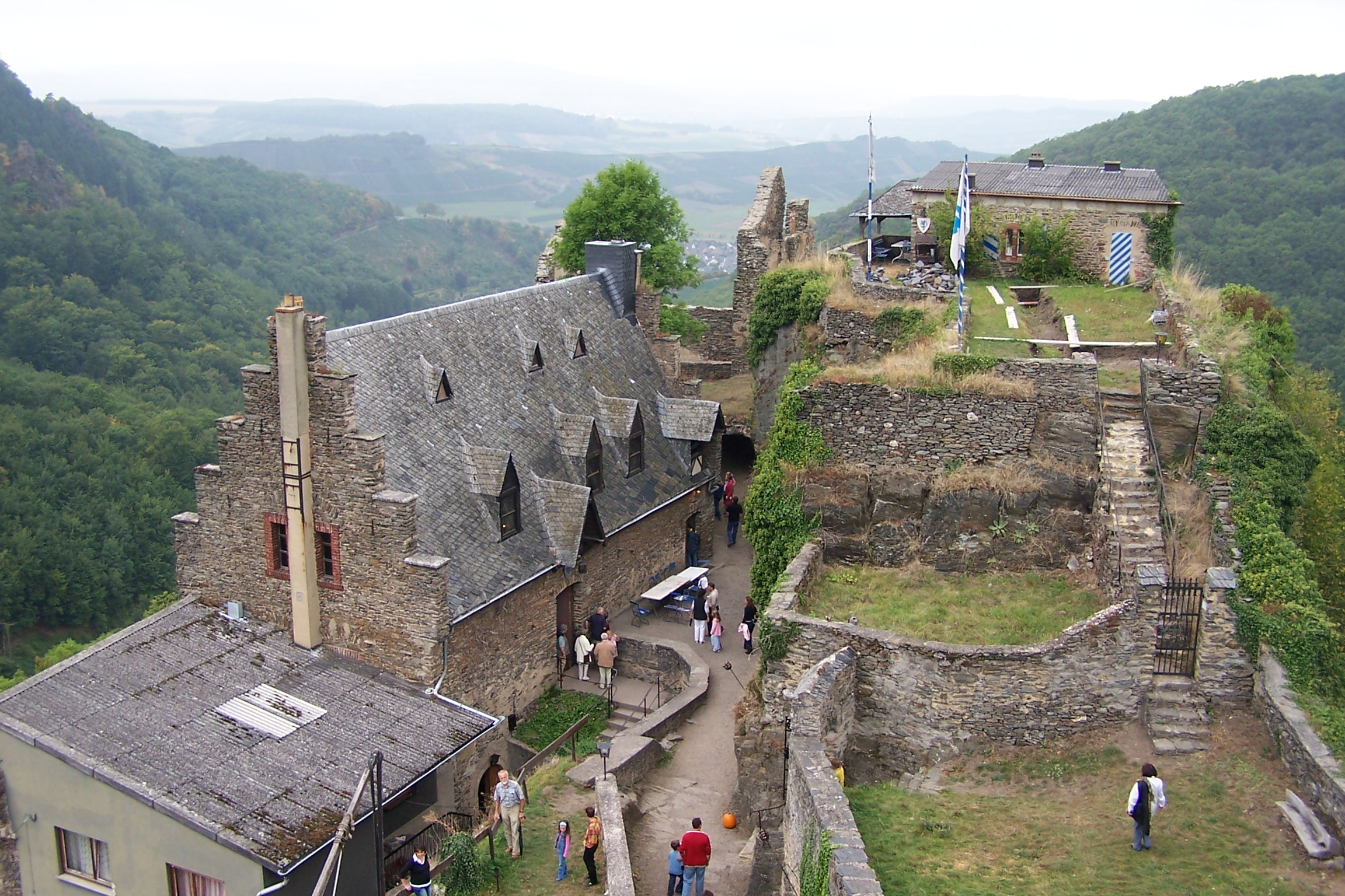 Schloss Veldenz, Deutschland, Rheinland-Pfalz